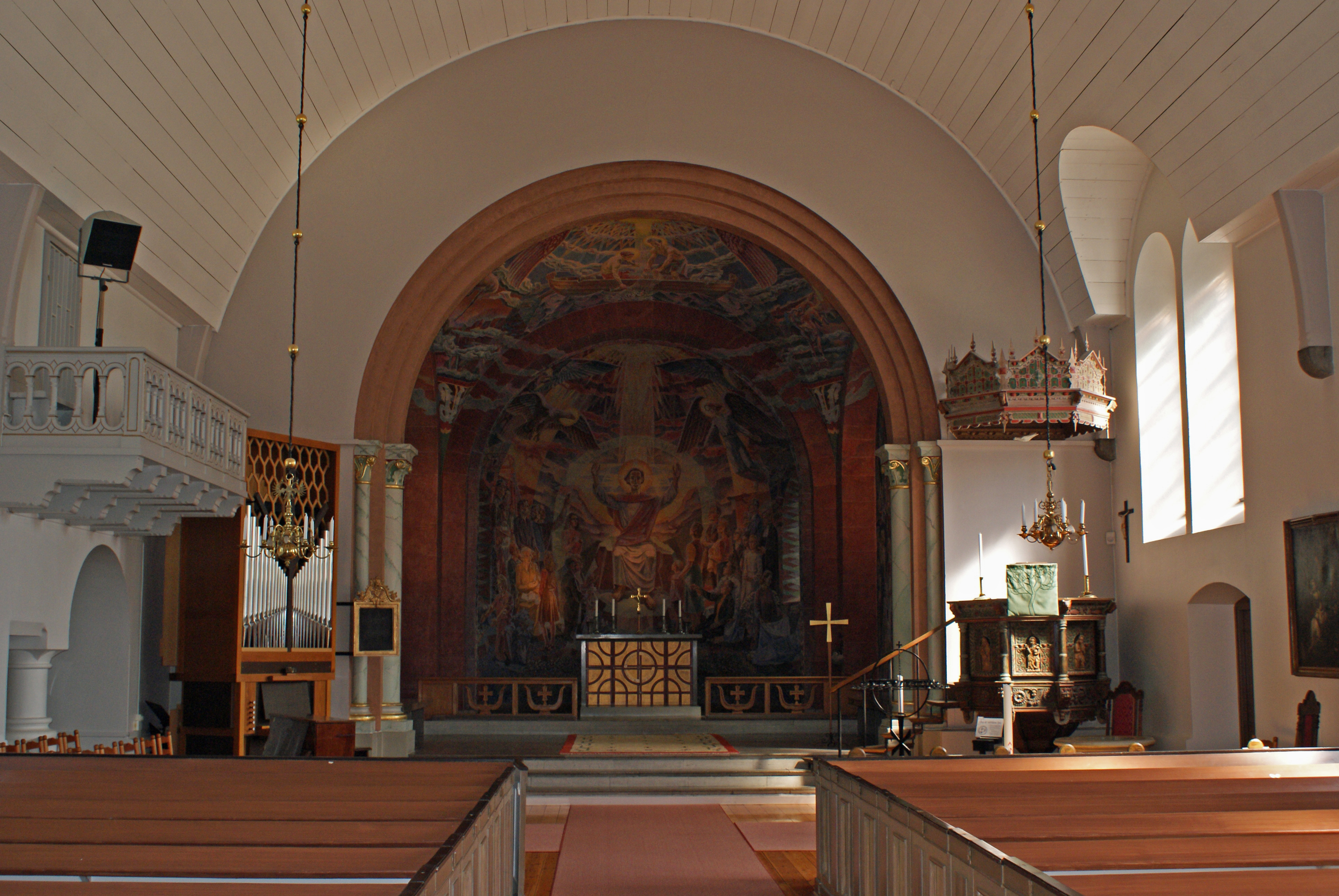 Interiör från Sura kyrka med målningar i koret av konstnären Nils-Aaron Berge